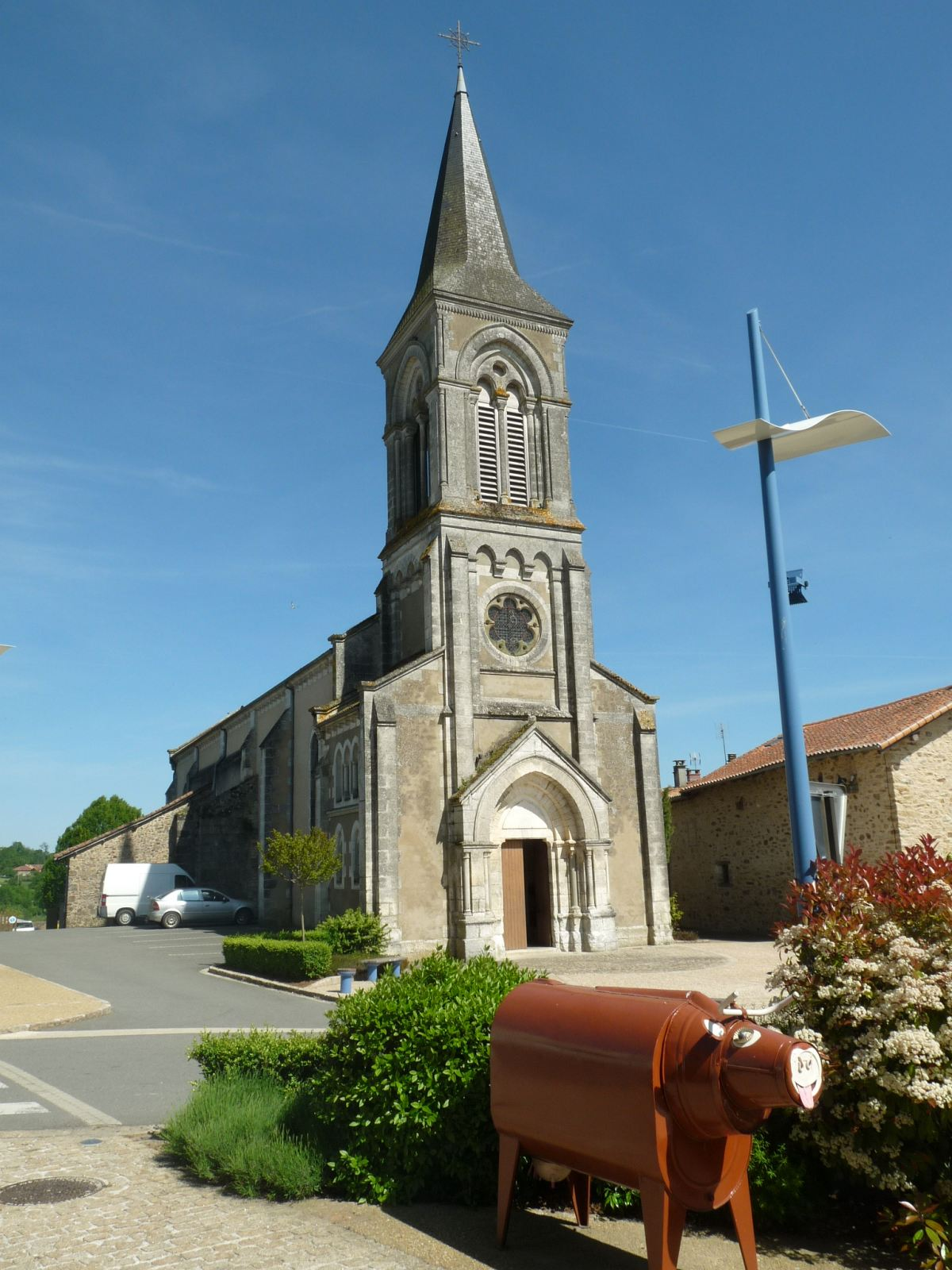 église de Massignac, Charente, France